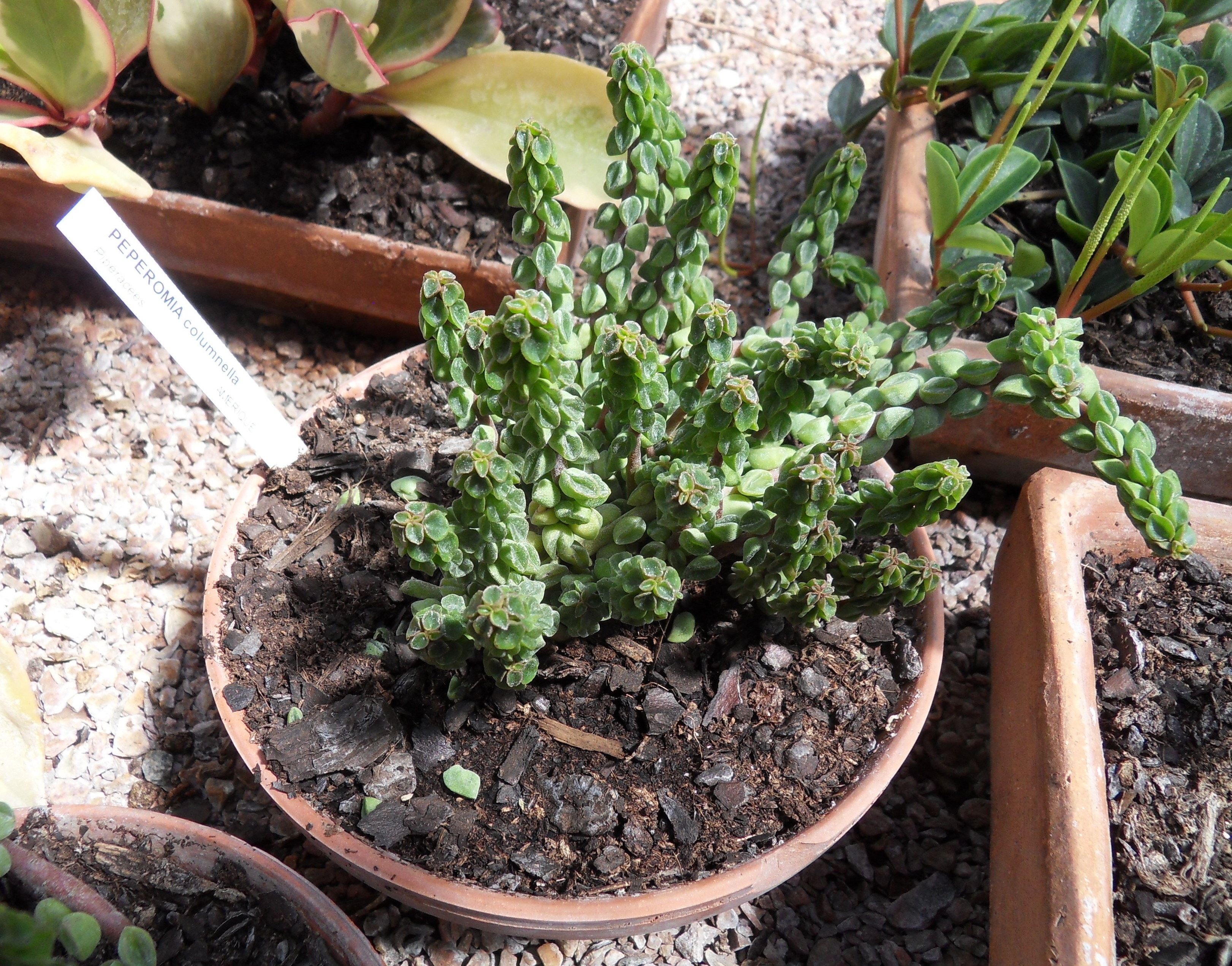 Peperomia columnella dans les serres de l'École Du Breuil, à Paris.